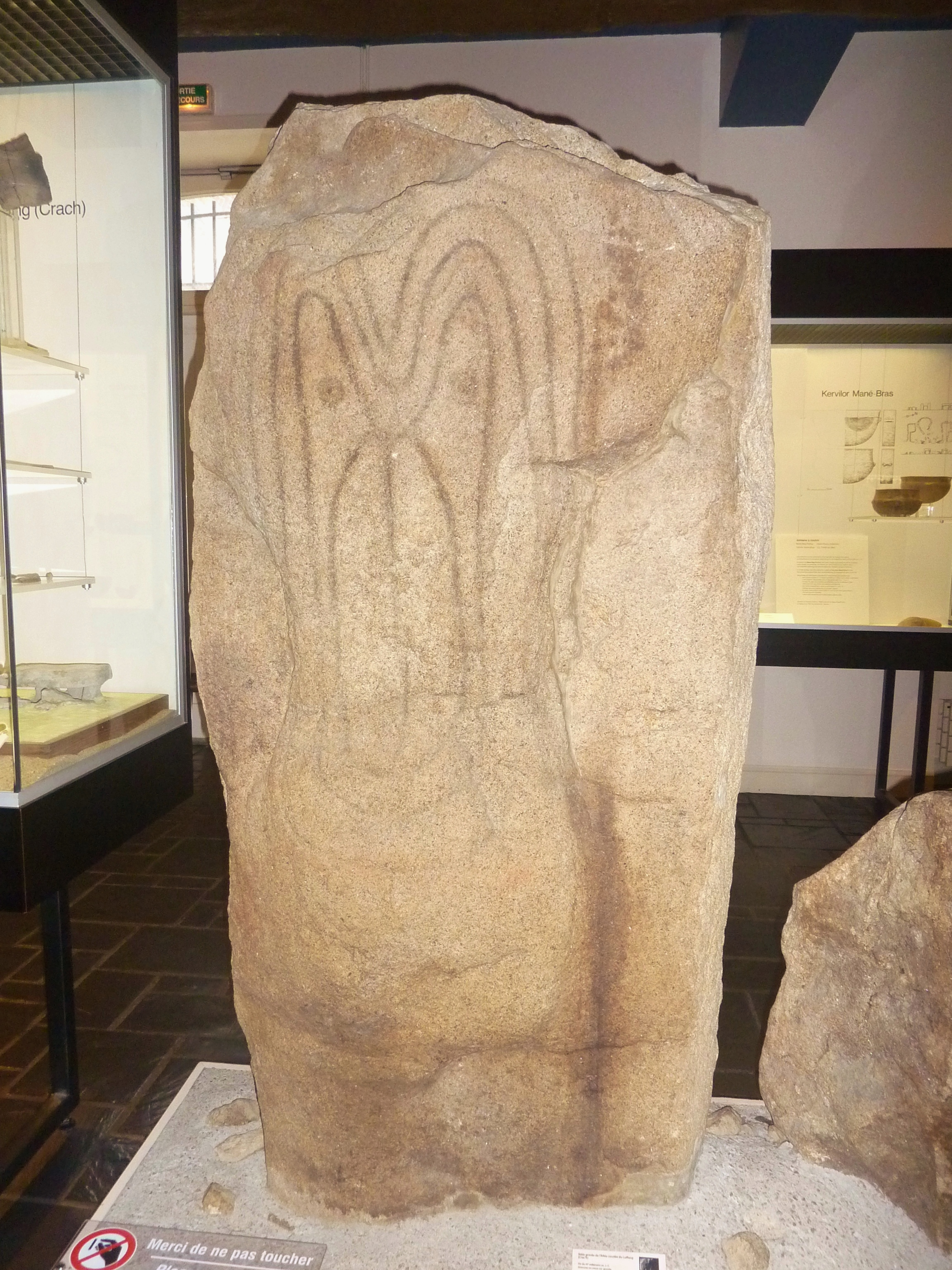 Stèle gravée de l'allé coudée de Luffang en Crac'h (gravures en creux sur granite ; fin du IVe millénaire avant J.-C.) ; les pigments noirs surchargeant les gravures ont été rajoutés au début du XXe siècle afin d'améliorer la lisibilité de l'œuvre (Musée de préhistoire de Carnac)